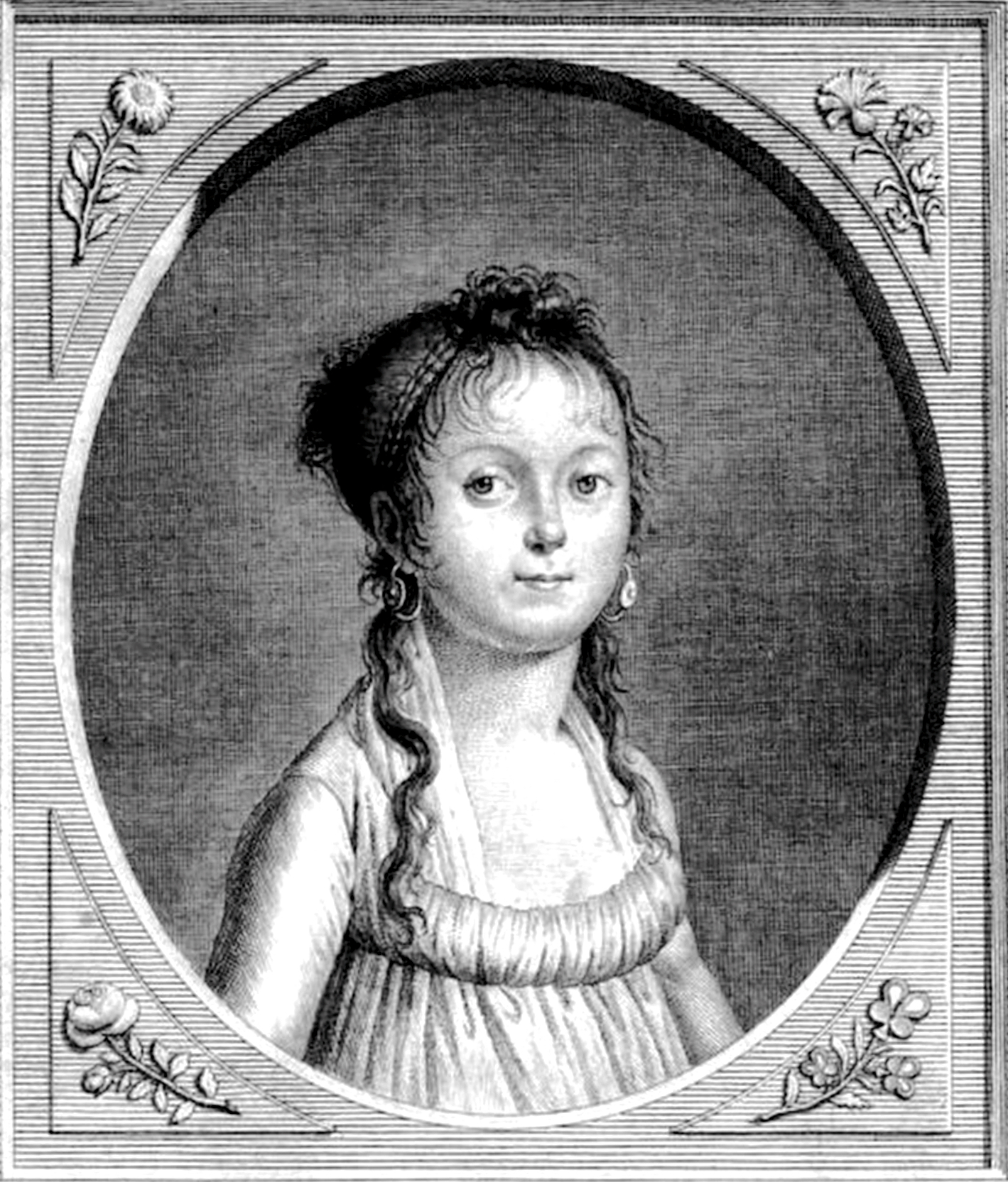 Gravure de C.-E. Gaucher d’après M.-T. de Noireterre représentant Fortunée Bernier (1782-1815), parue dans l'édition de son Dictionnaire historique, littéraire et bibliographique édité en 1804